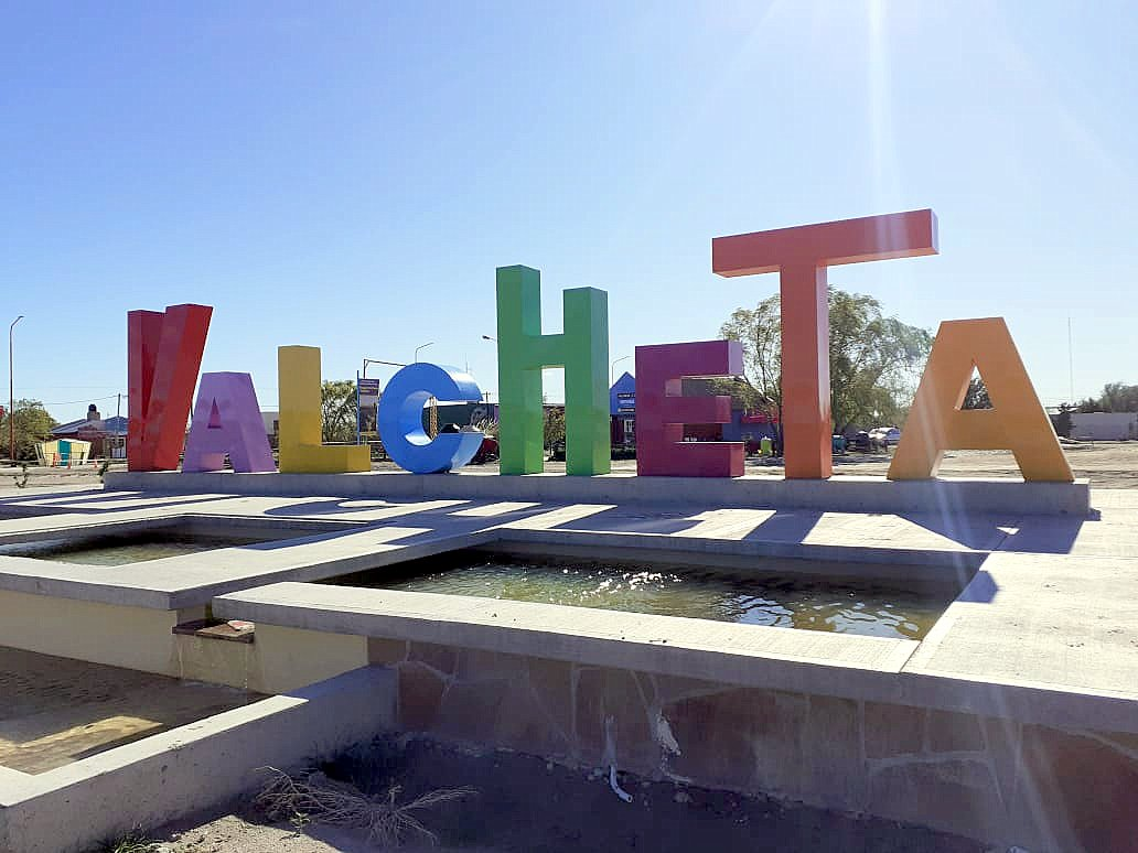 Valcheta en una mañana de cuarentena-covid-19.